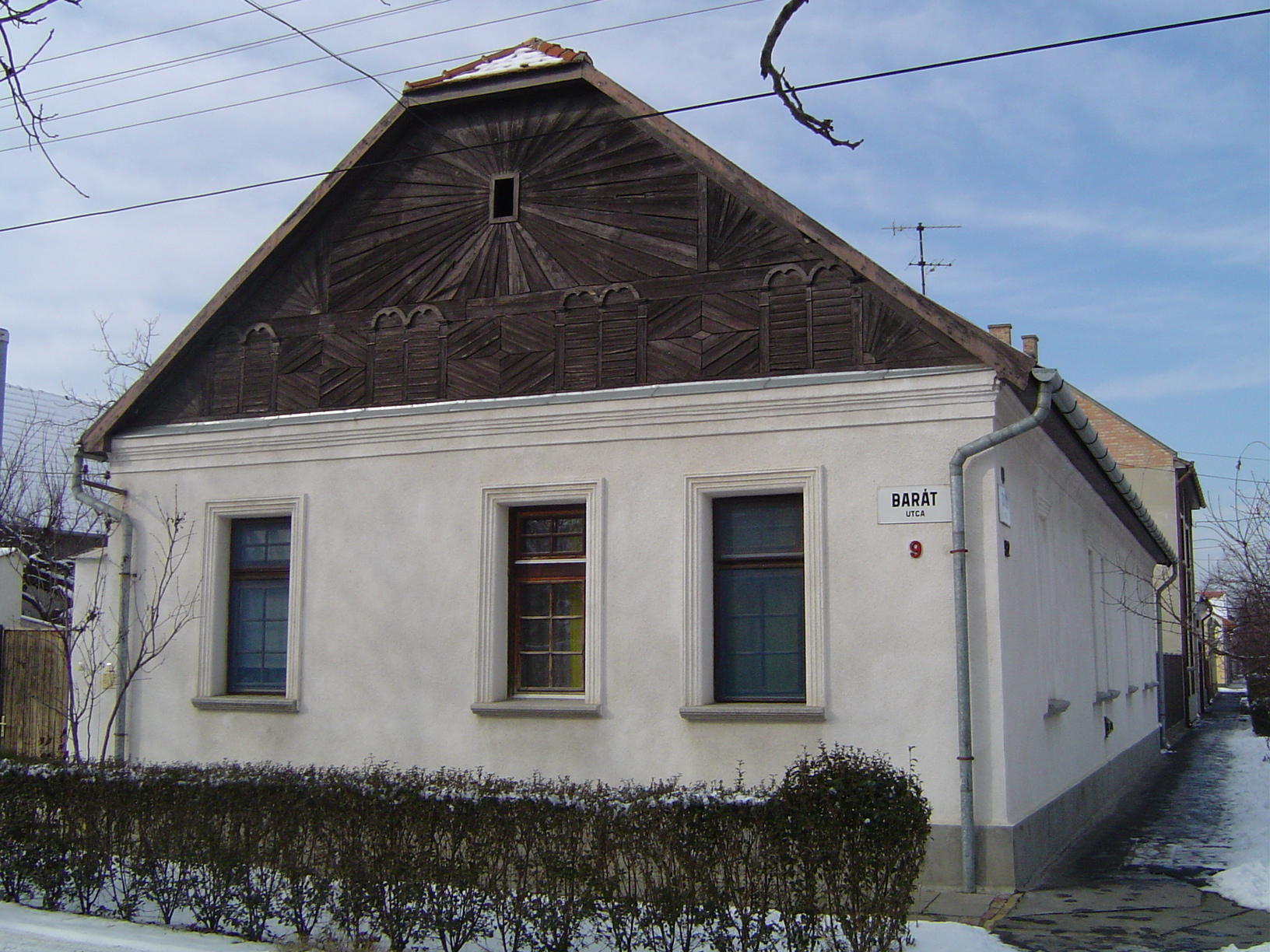 Szeged-alsóvárosi napsugaras ház, épült 1900-ban (Szeged-Alsóváros, Barát utca)